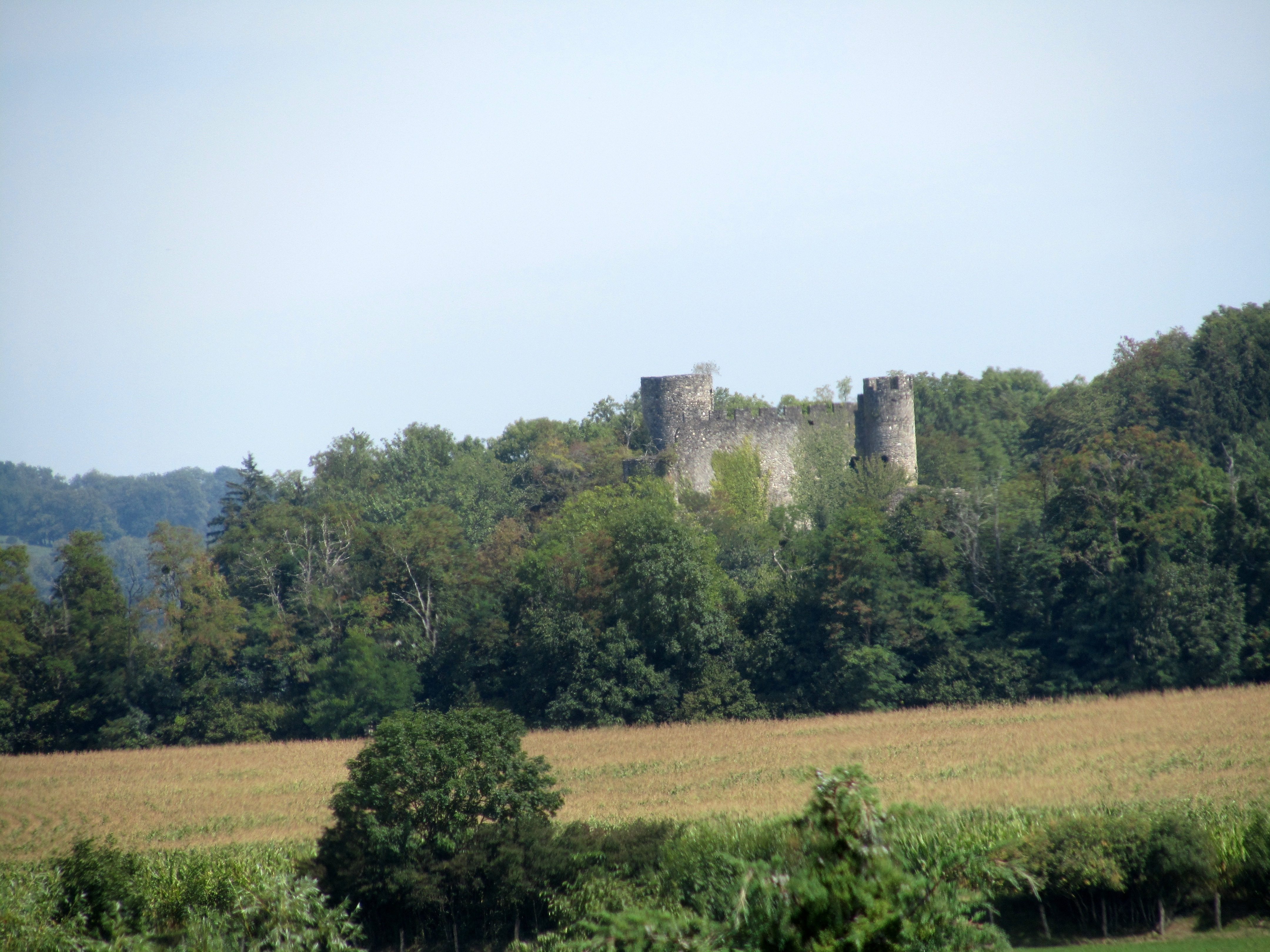 Château de la Rochette à Lully (Haute-Savoie)